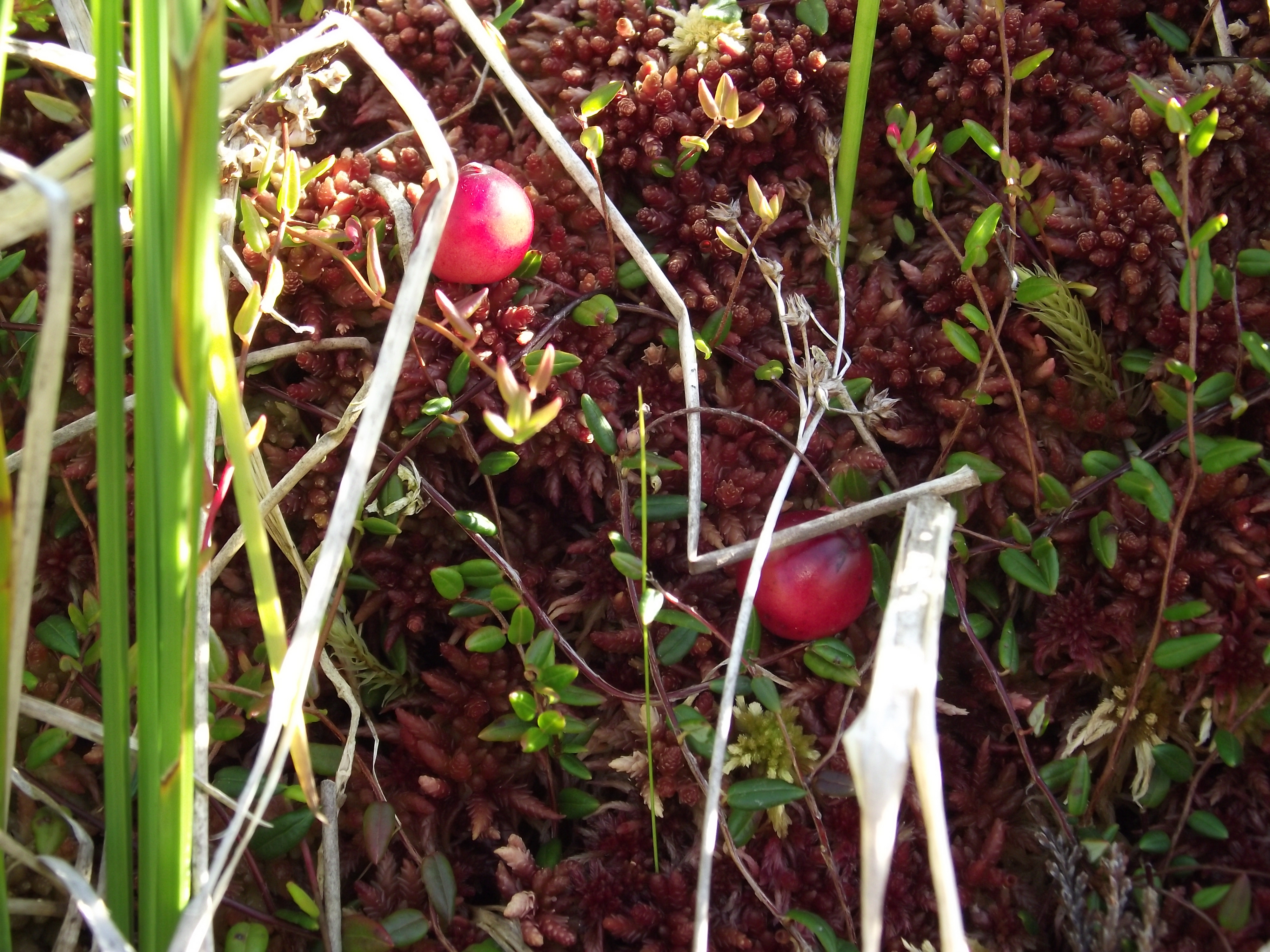 Canneberge (Vaccinium oxycoccos) dans une tourbière des monts d'Aubrac (Massif central, France).